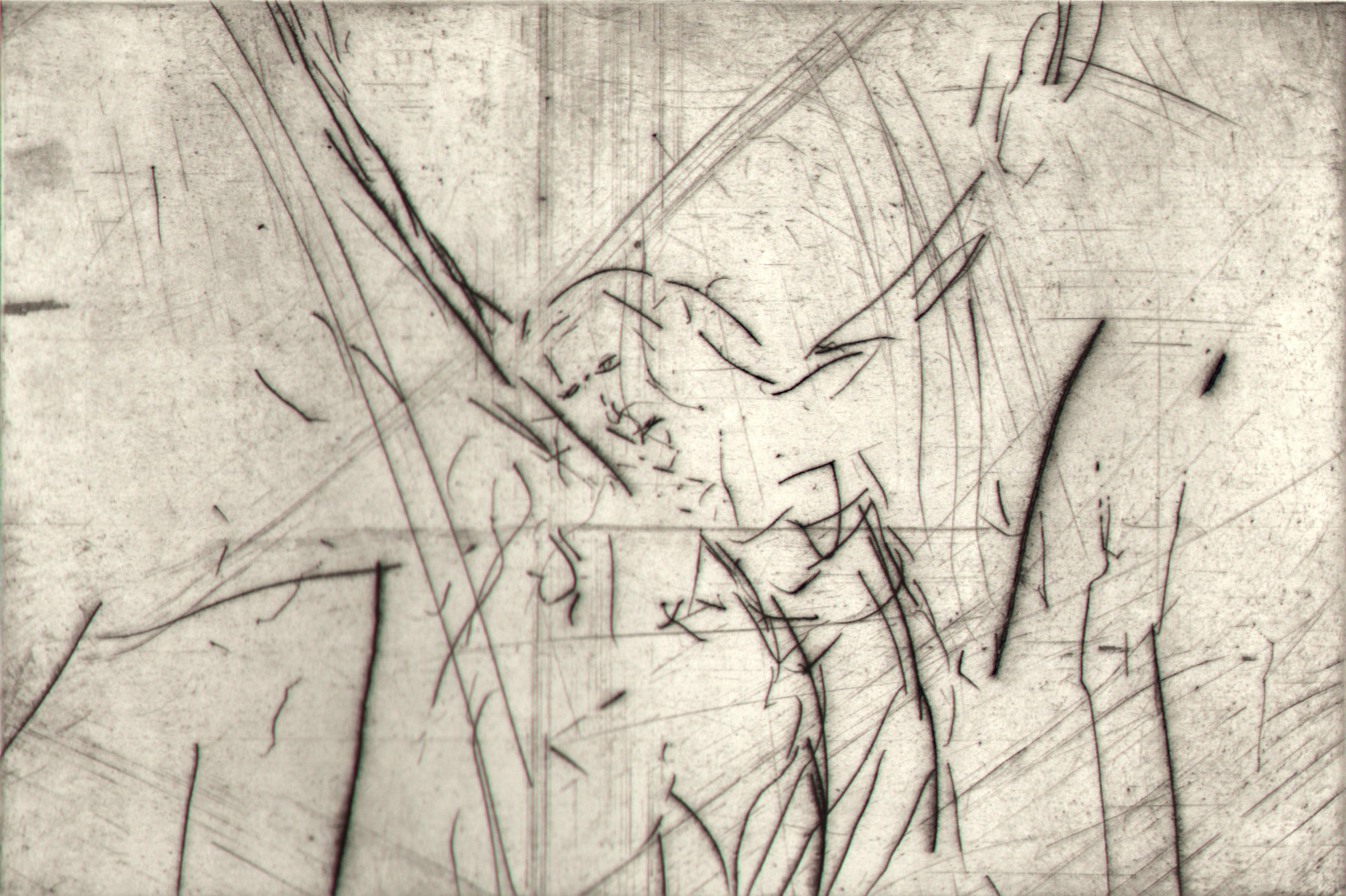 Eine Kaltnadelradierung, die der Bildhauer Peter Marggraf für die Kassette "Passio" dedruckt hat.